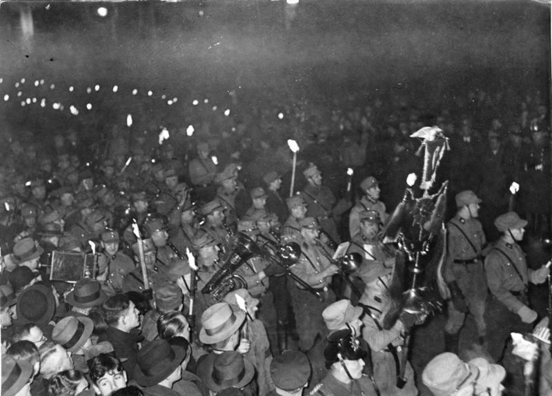 Der Fackelzug zu Ehren des neuen Reichskanzlers Adolf Hitler bewegt sich durch die Wilhelmstraße in Berlin am Abend des 30. Januar 1933.